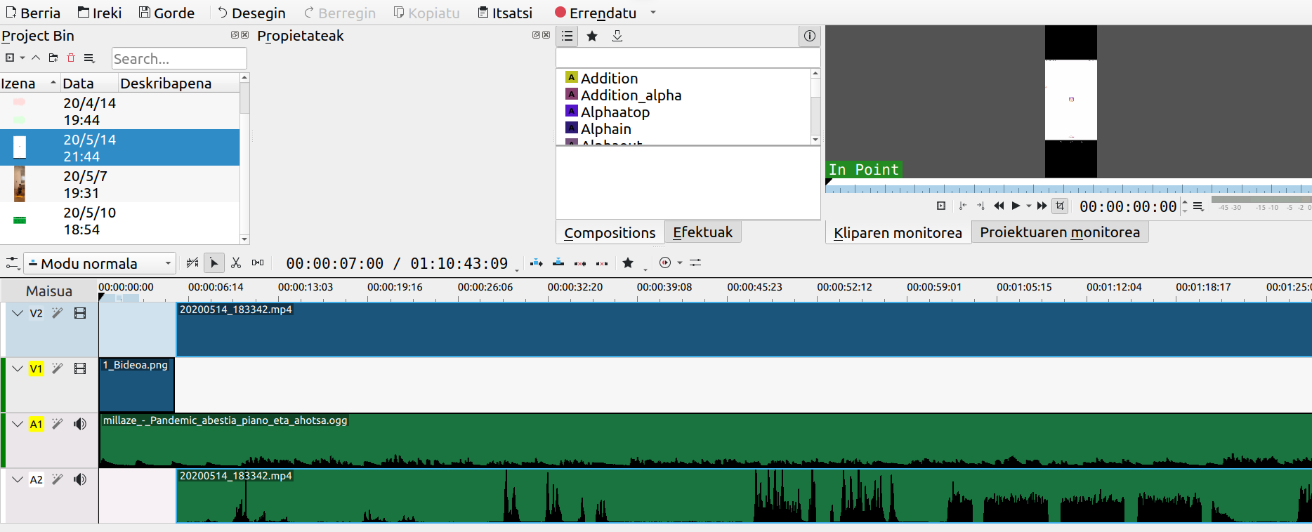 Kdenlive pantaila-argazkia. Interfazea euskaraz